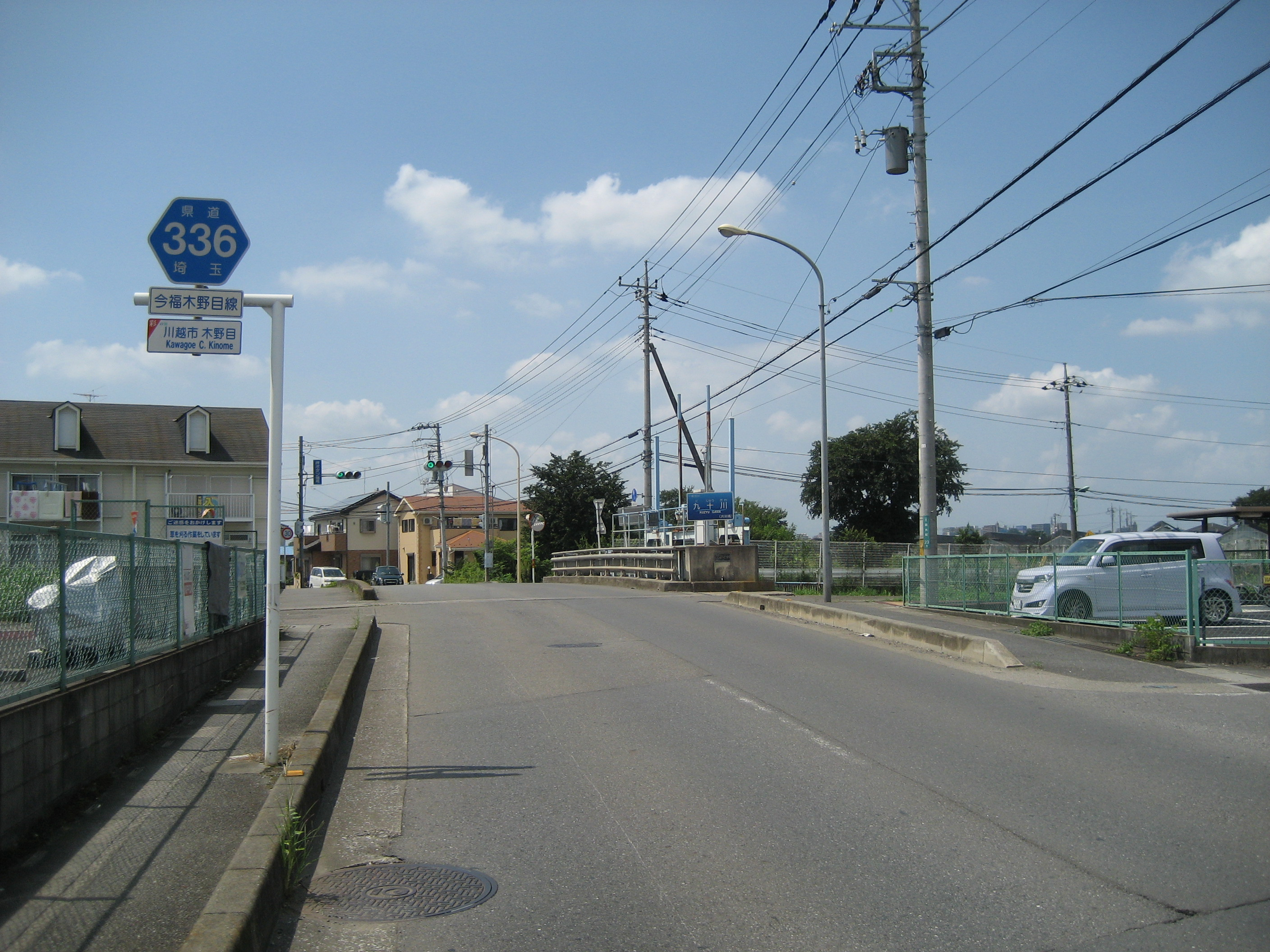 埼玉県道336号線川越市木野目